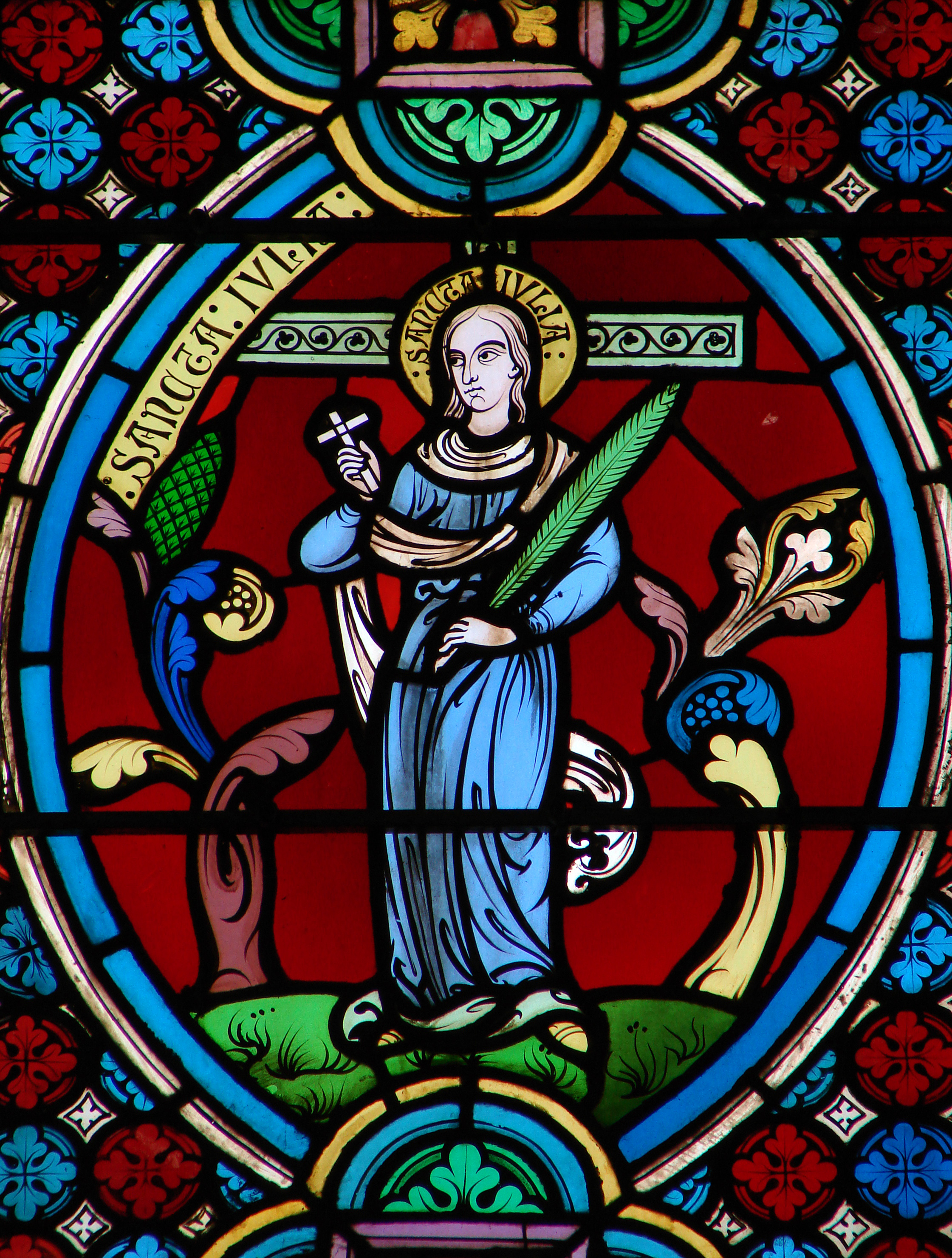 Détail d'un vitrail néogothique de la cathédrale de Meaux, daté de 1867: Sainte Julie.